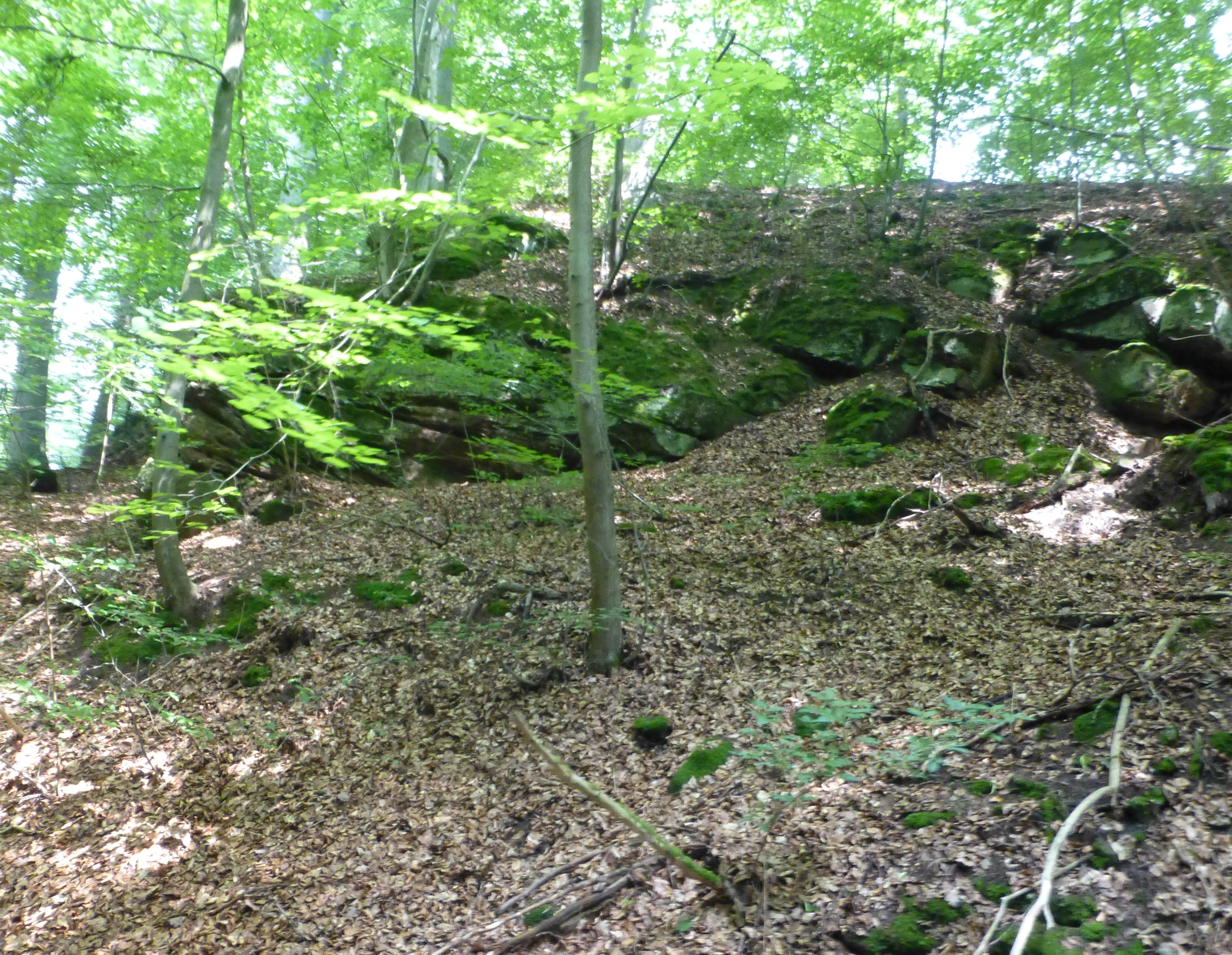 Sandsteinformationen an der Alten Burg bei Heiligenstadt